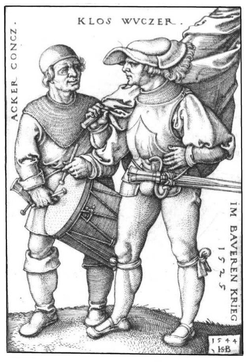 Sebald Beham: Acker Concz und Klos Wuczer im Baveren Krieg 1525, 1544